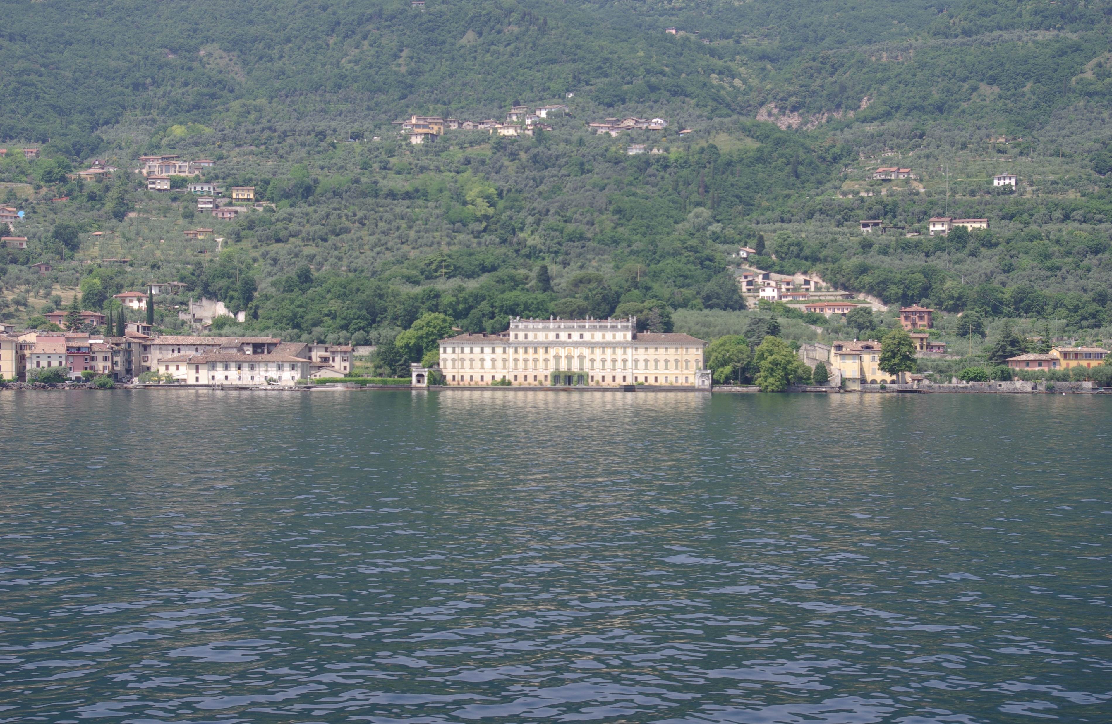 Blick vom Gardasee auf die Villa Bettoni in Gargnano